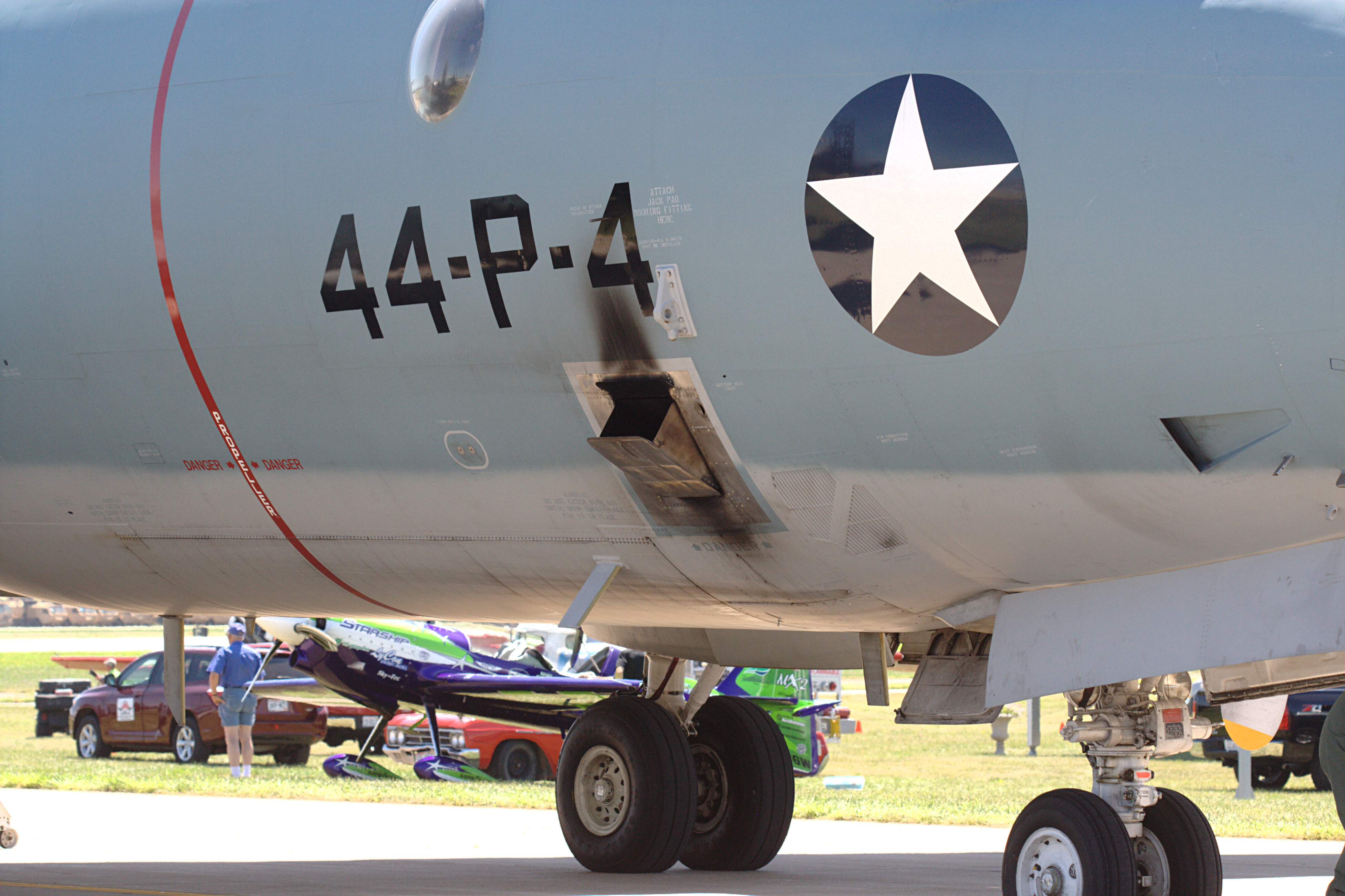 P-3 APU